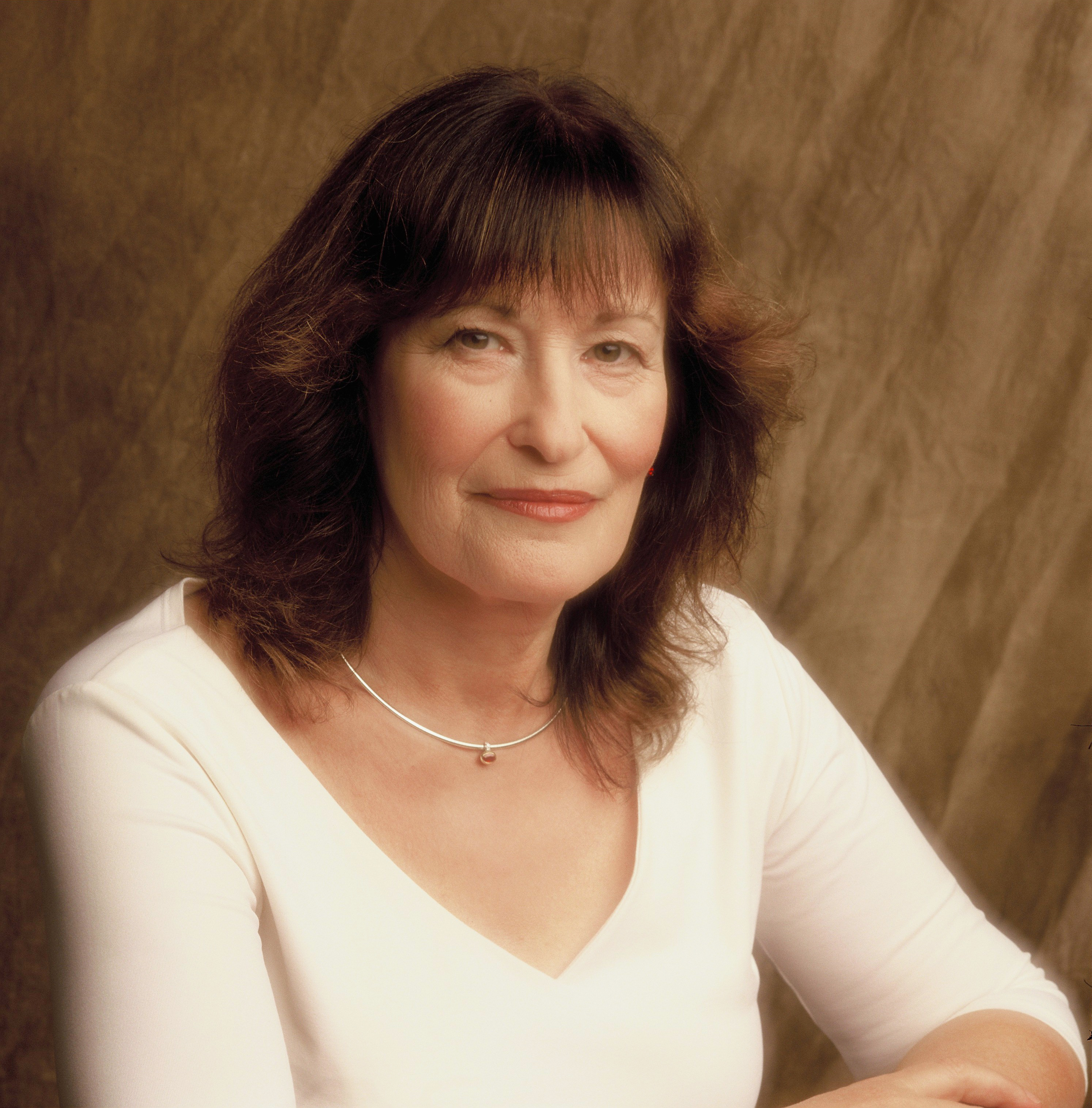 פרופ' זהבה כספי